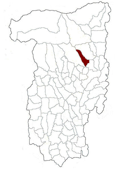 Lage der Gemeinde Muereasca im rumänischen Kreis Vâlcea in Rumänien.